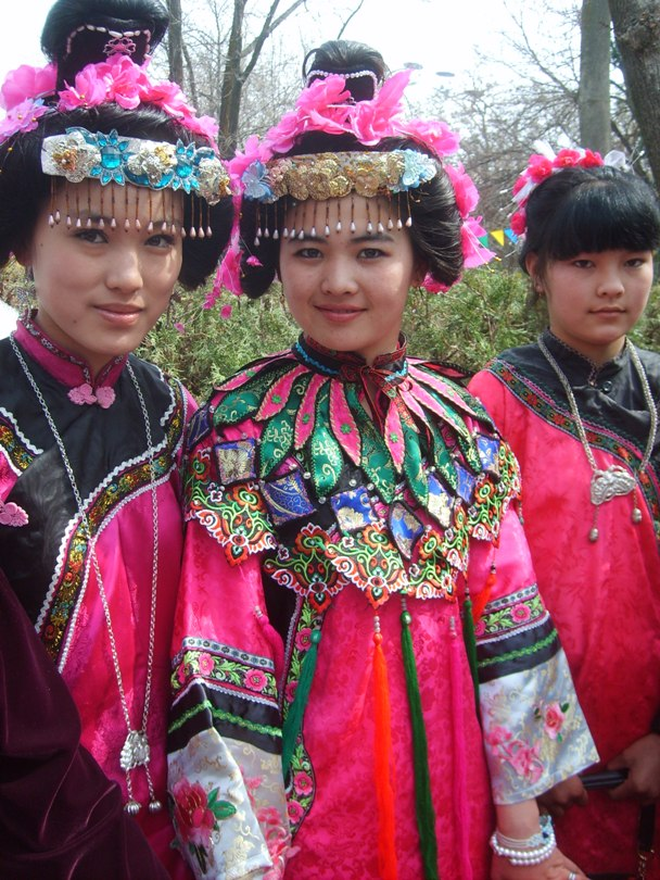 Дунгани